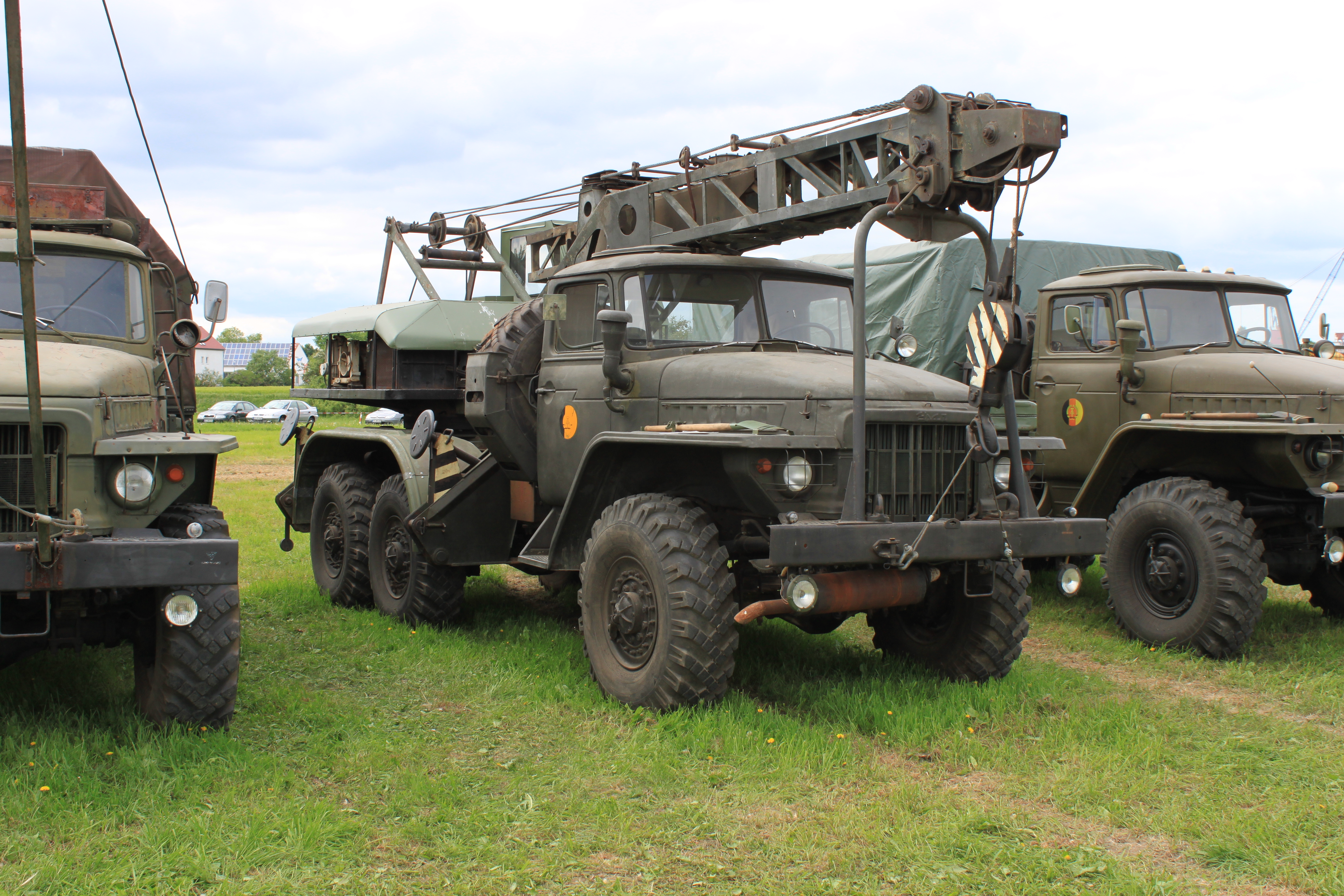 URAL 375D - (Lehrmodell ADK 8T210)